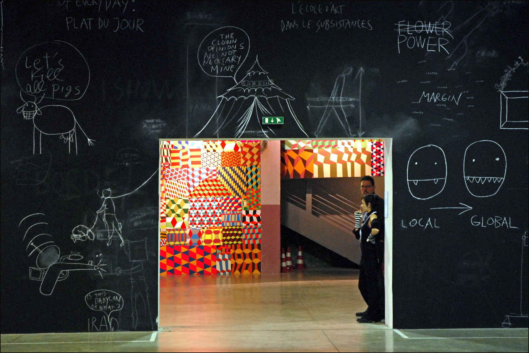 The everyday drawings 1 (au premier plan) 2009 tableau noir et craie blanche oeuvre de Dan Perjovschi (1961, Bucarest) La Sucrière Xe Biennale de Lyon "Le spectacle du quotidien" Commissaire : Hou Hanru